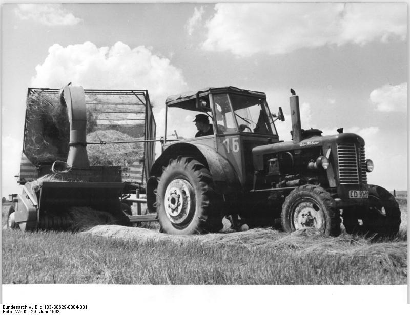 LPG Wiesenau, Heuernte Zentralbild Weiß 29.6.1963 Kreis Eisenhüttenstadt: LPG Wiesenau beendet Heumahd Die LPG "Clement Gottwald" in Wiesenau, die Genossenschaft mit der größten Grünlandfläche im Kreis Eisenhüttenstadt, konnte auf ihren 180 ha Wiesen und Weiden am 27. Juni dieHeumahd beenden. Bis Ende dieser Woche sollen die Flächen auch geräumt sein. UBz: Mit einem neuentwickelten Aufsammel-Schneid-Gebläse werden allein 2-3 der Gesamtfläche geräumt. Das Gerät hat eine dreifache Leistung gegenüber der Sammelpresse und wird von nur einem Traktoristen bedient (hier Traktorist Helmuth Abraham).